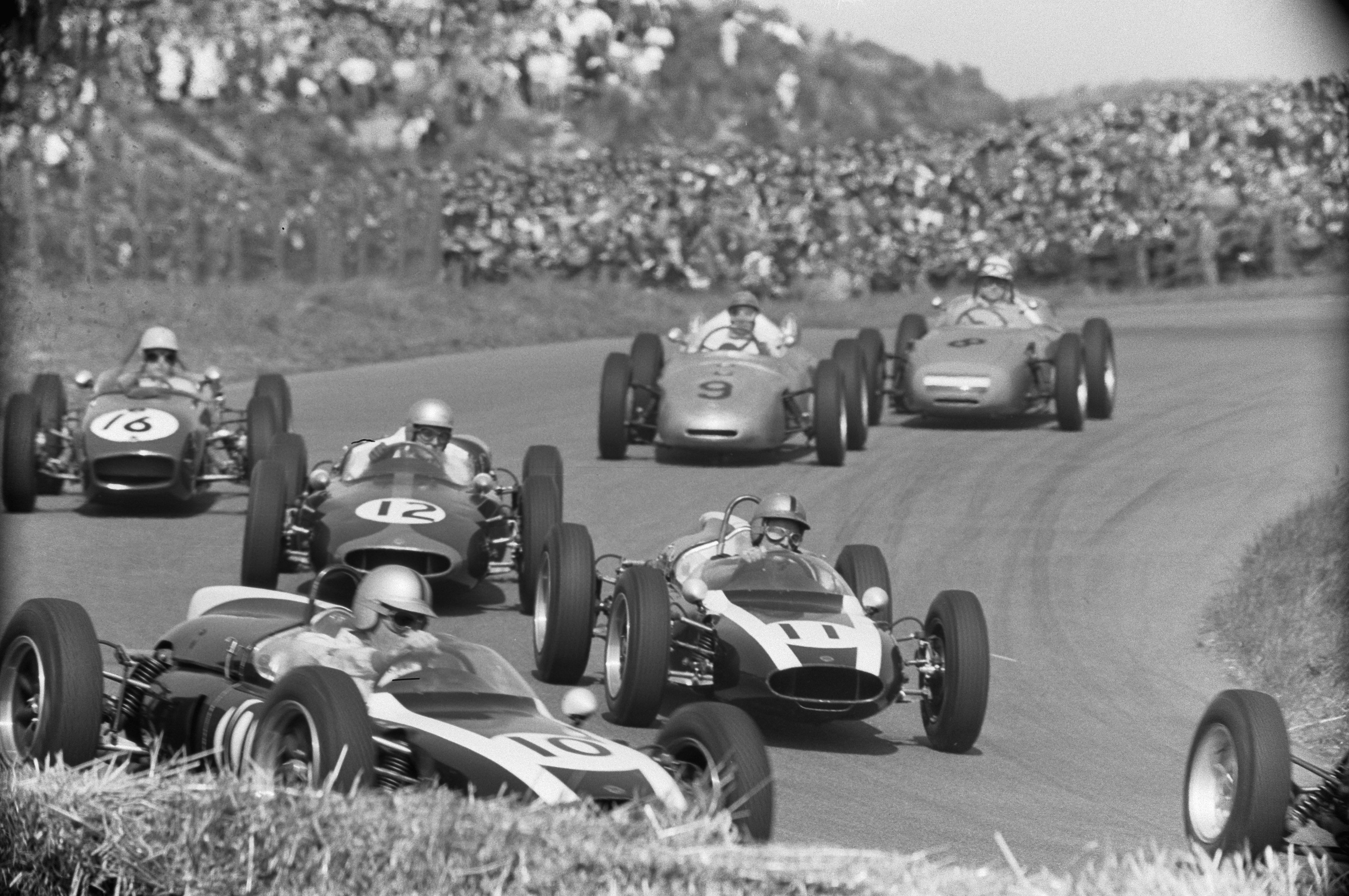 Collectie / Archief : Fotocollectie Anefo Reportage / Serie : Grand Prix Zandvoort 1961 Beschrijving : Vlak na de start, Brabham, Moss, Surtees, Taylor, Hermann Datum : 22 mei 1961 Locatie : Noord-Holland, Zandvoort Trefwoorden : autosport Fotograaf : Harry Pot / Anefo Auteursrechthebbende : Nationaal Archief Materiaalsoort : Negatief (zwart/wit) Nummer archiefinventaris : bekijk toegang 2.24.01.05 Bestanddeelnummer : 912-5054